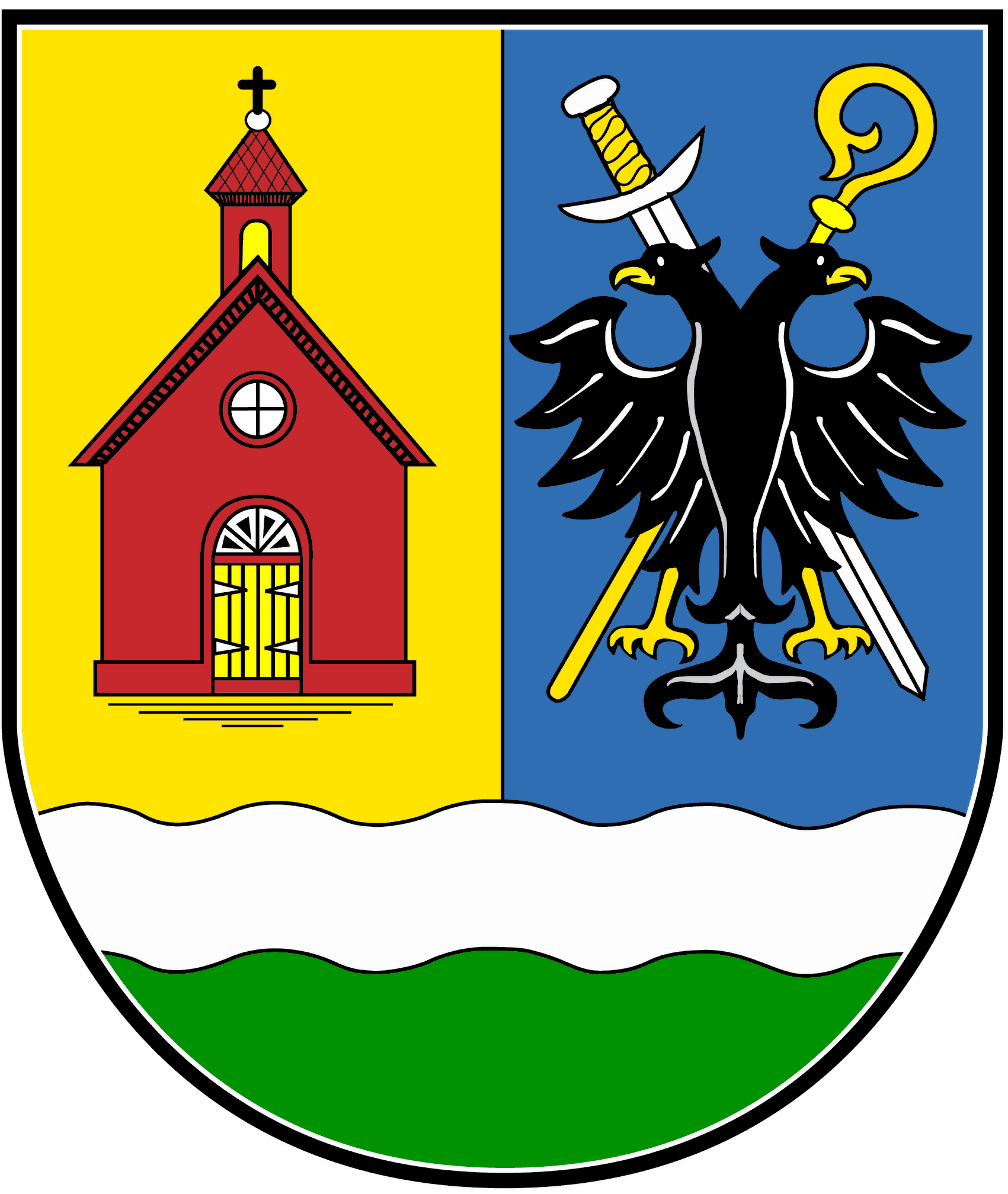 Wappen der Ortsgemeinde Taben-Rodt